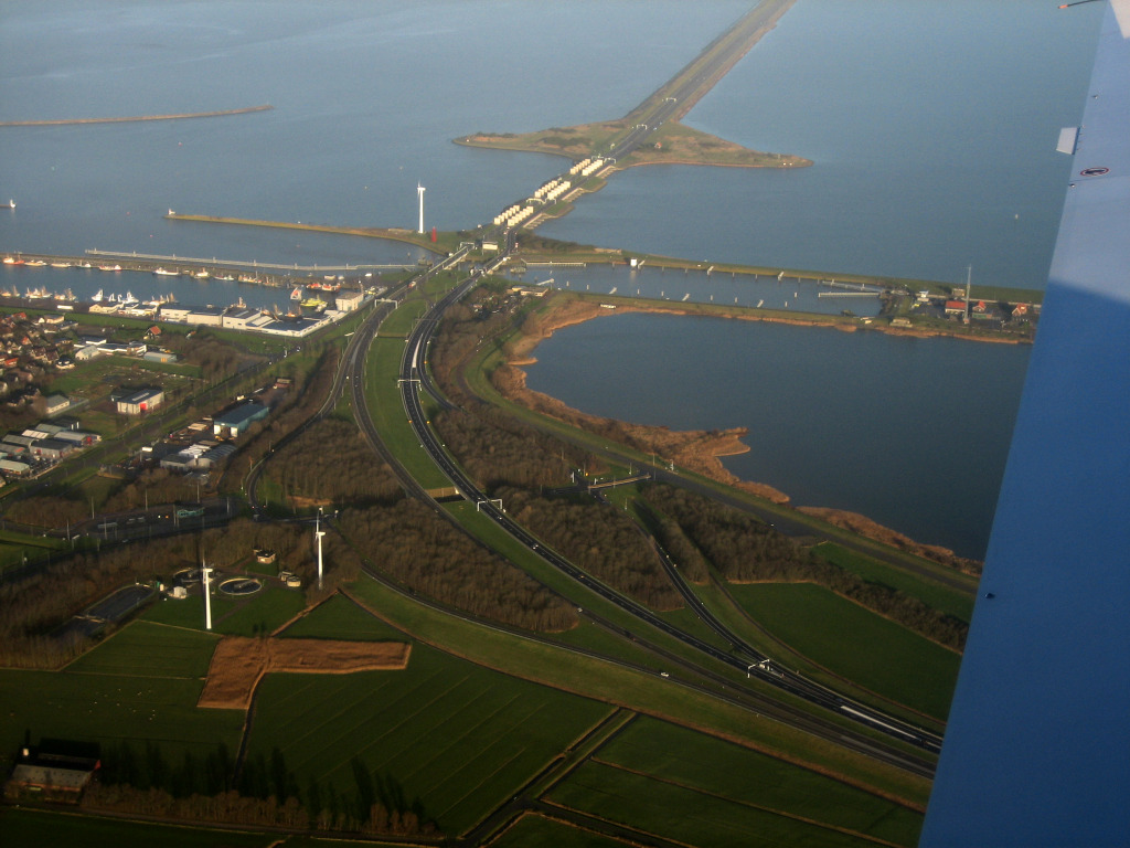 den Oever and Afsluitdijk